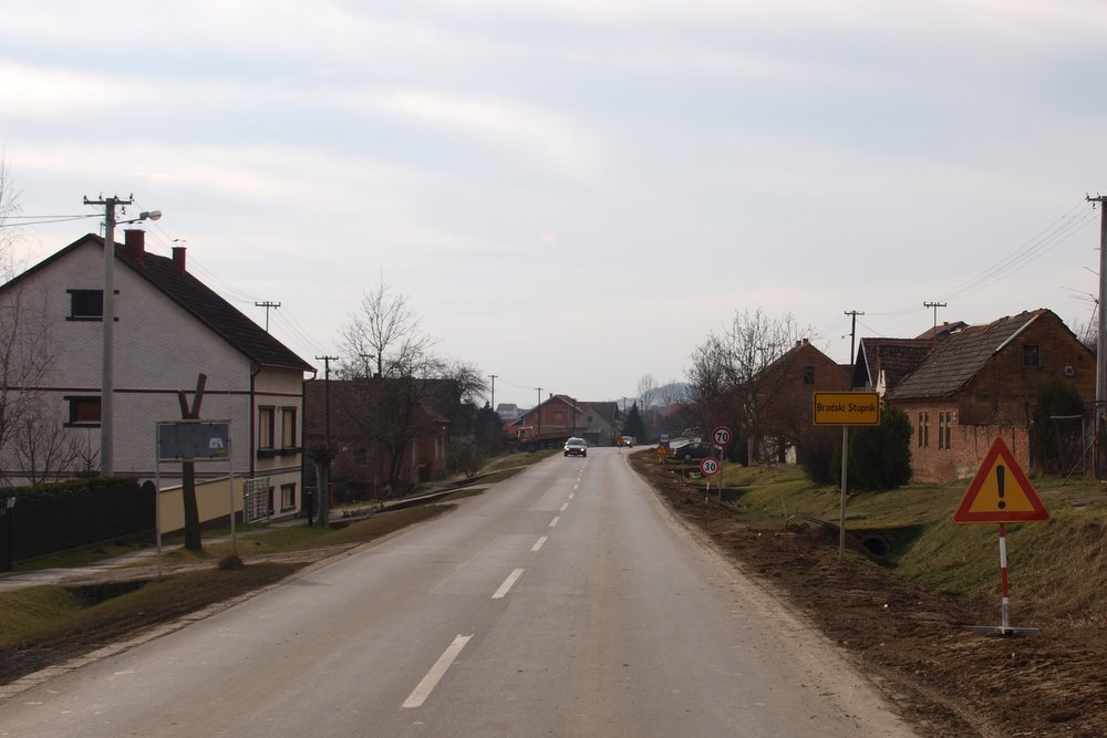 Ulaz u selo Brodski Stupnik Brodsko-posavska županija.